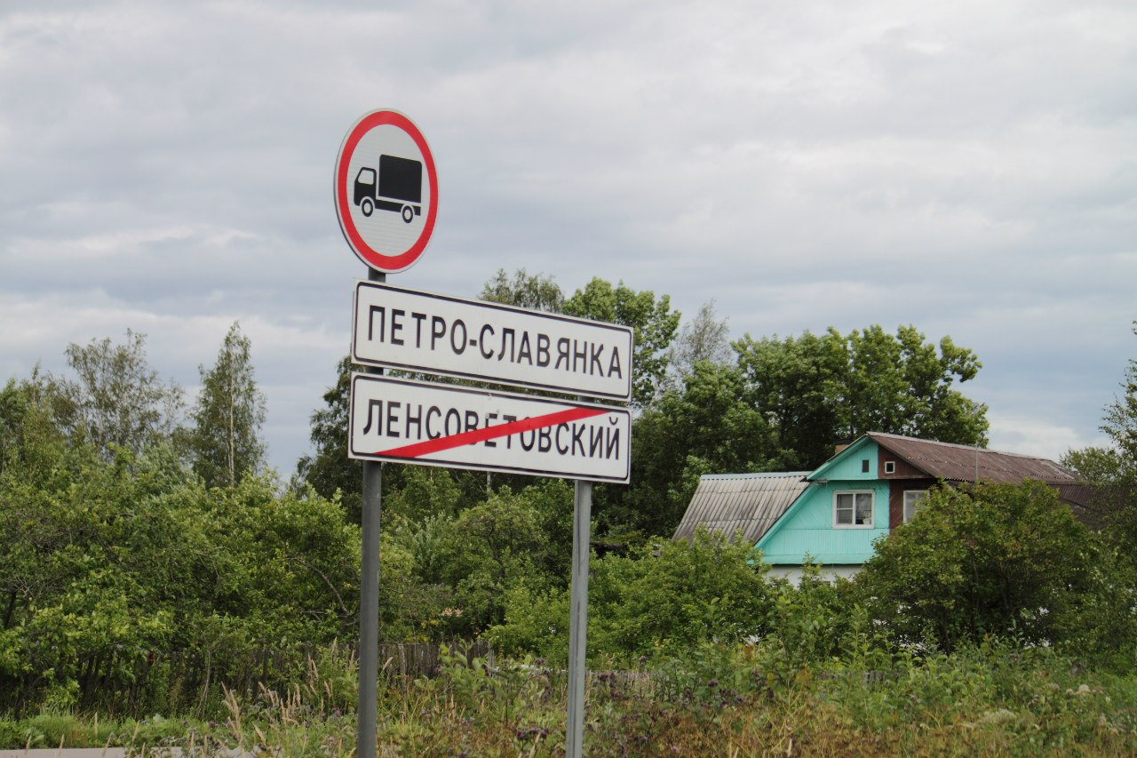 Petro-Slavyanka - village near St.Petersburg on Slavyanka river